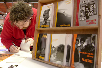 Séance de signature au stand du Somnambule Equivoque